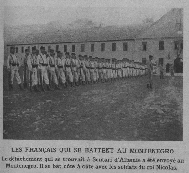 le Miroir N°_51, page_16_les troupes françaises combattant au_Monténégro en 1914.